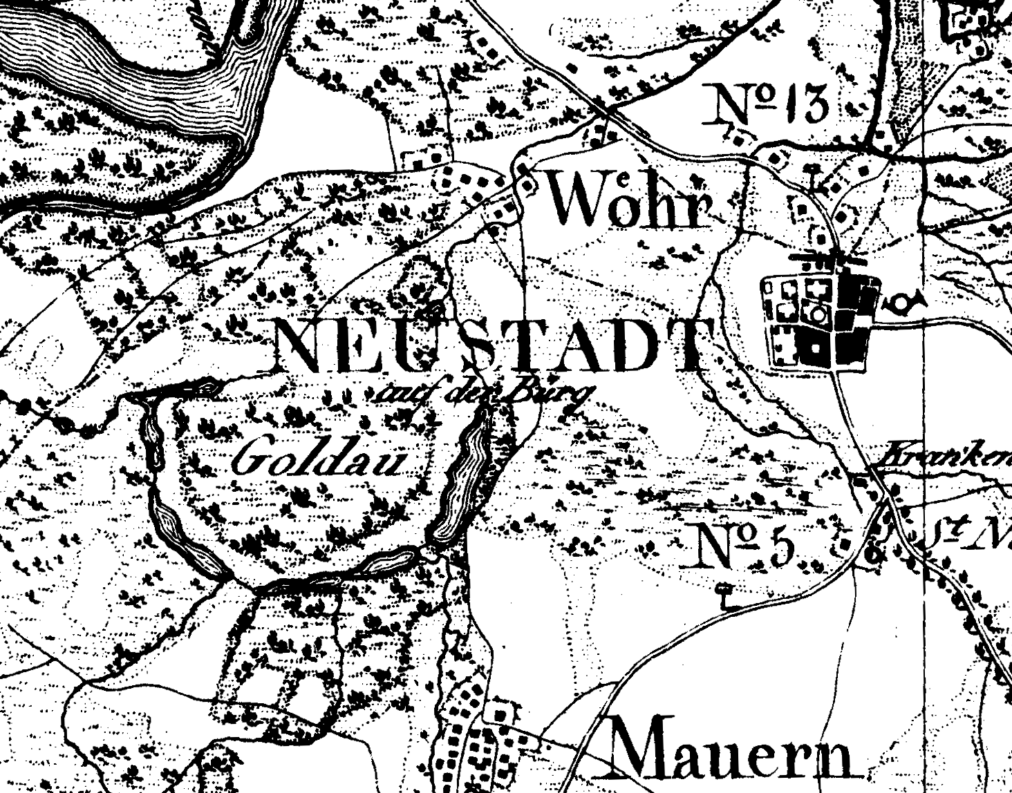 Burg Wöhr, Landkreis Kelheim, Niederbayern auf der topografischen Karte von 1819 als "auf der Bürg". Wöhr war hochmittelalterlicher Stammsitz des Adelsgeschlechts der Herrn von Wöhr sowie des herzoglichen Urbaramtes „ze Werde“ von dem aus Natural- und Geldabgaben aus herzoglichen Gütern verwaltet wurden.